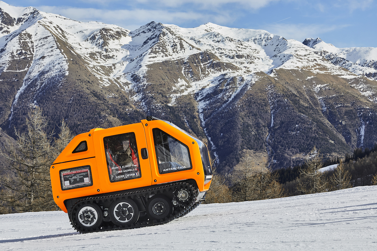 Véhicule Venturi Antarctica